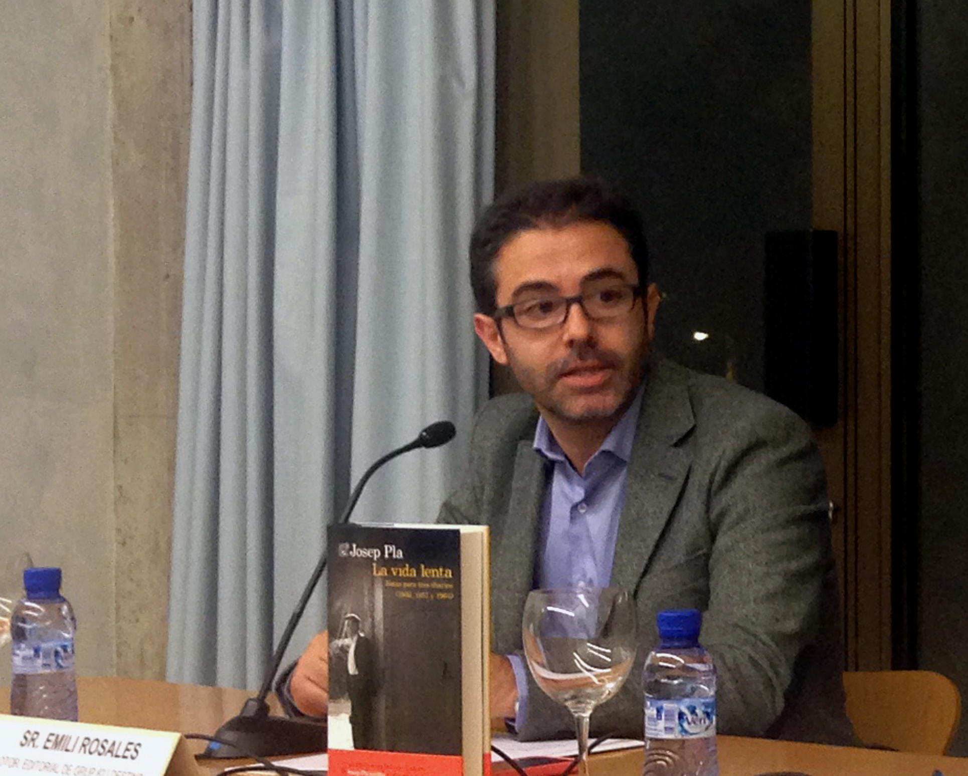 Acte de presentació del llibre inèdit de Josep Pla "La vida lenta (Notes per a tres dietaris, 1956, 1957, 1964)". Va tenir a Fundació Josep Pla el divendres 12 de desembre de 2014 a les 19:30. Van intervenir Emili Rosales, director editorial de Grup 62 i Destino, Xavier Pla, curador de l'edició i director de la Càtedra Josep Pla i Xavier Rocas, secretari del Patronat de la Fundació Josep Pla i regidor de l'Ajuntament de Palafrugell.